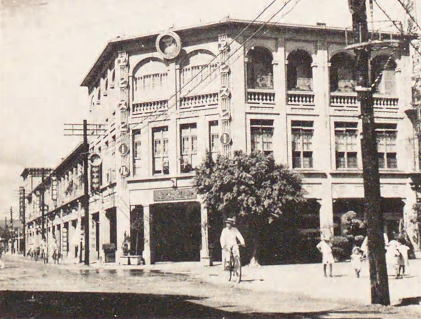 臺中市營店舖，位於台中第一市場外側